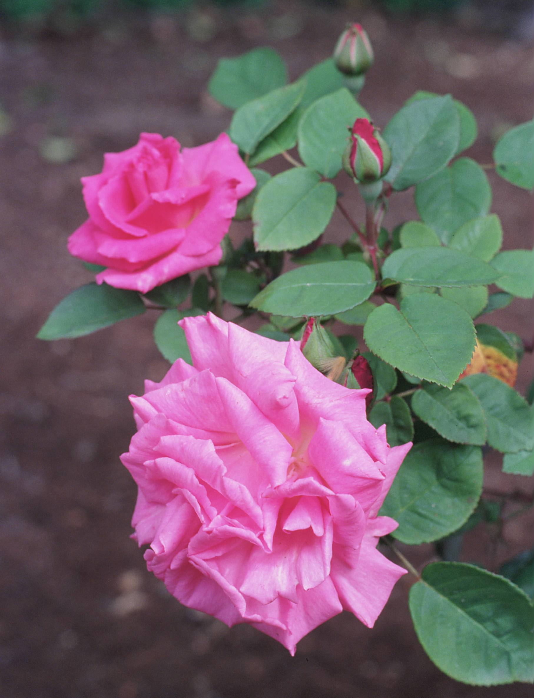 Rosa 'Zephirine Drouhin', gr. Borbonianas, sect. Chinensis. Real Jardín Botánico, Madrid